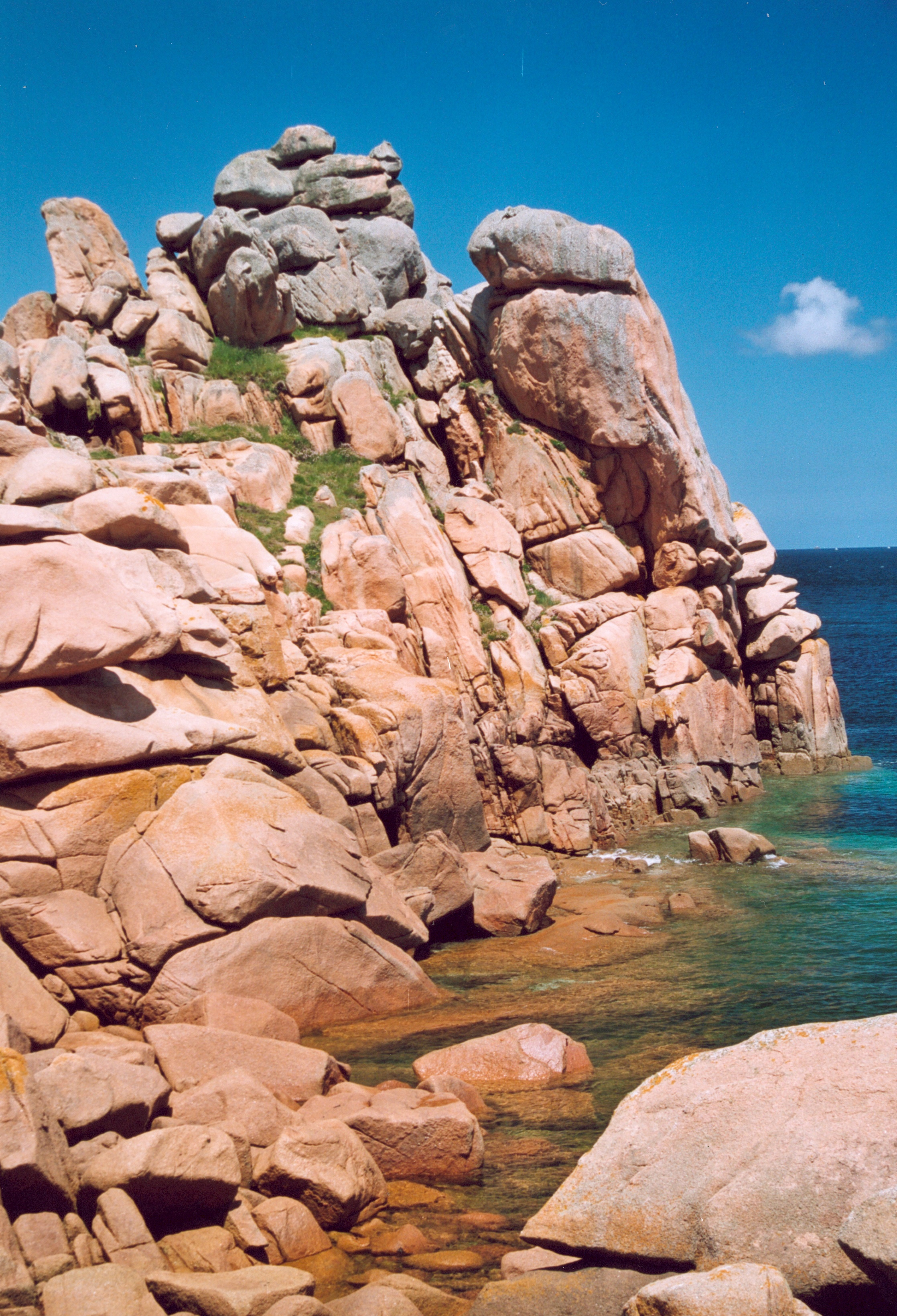 France Bretagne Côtes d'Armor Côte de granit rose